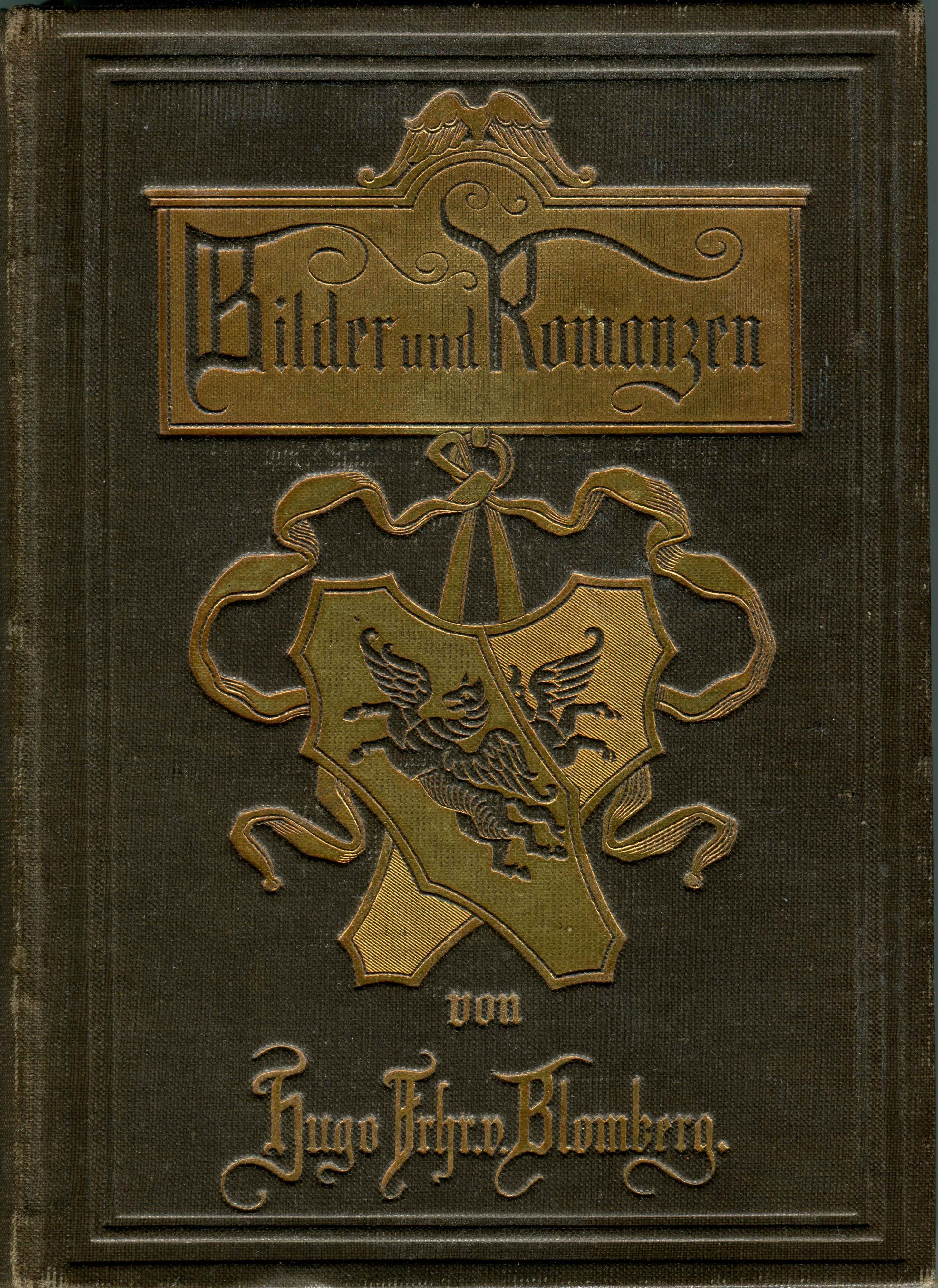 Buchtitel Bilder und Romanzen von Hugo von Blomberg